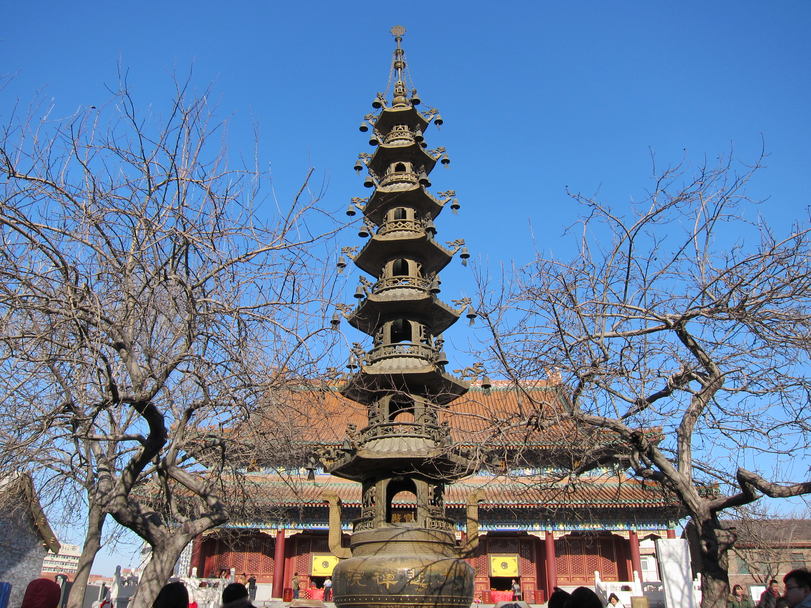 元旦的大悲禪院中文（中国大陆）: 元旦的大悲禅院